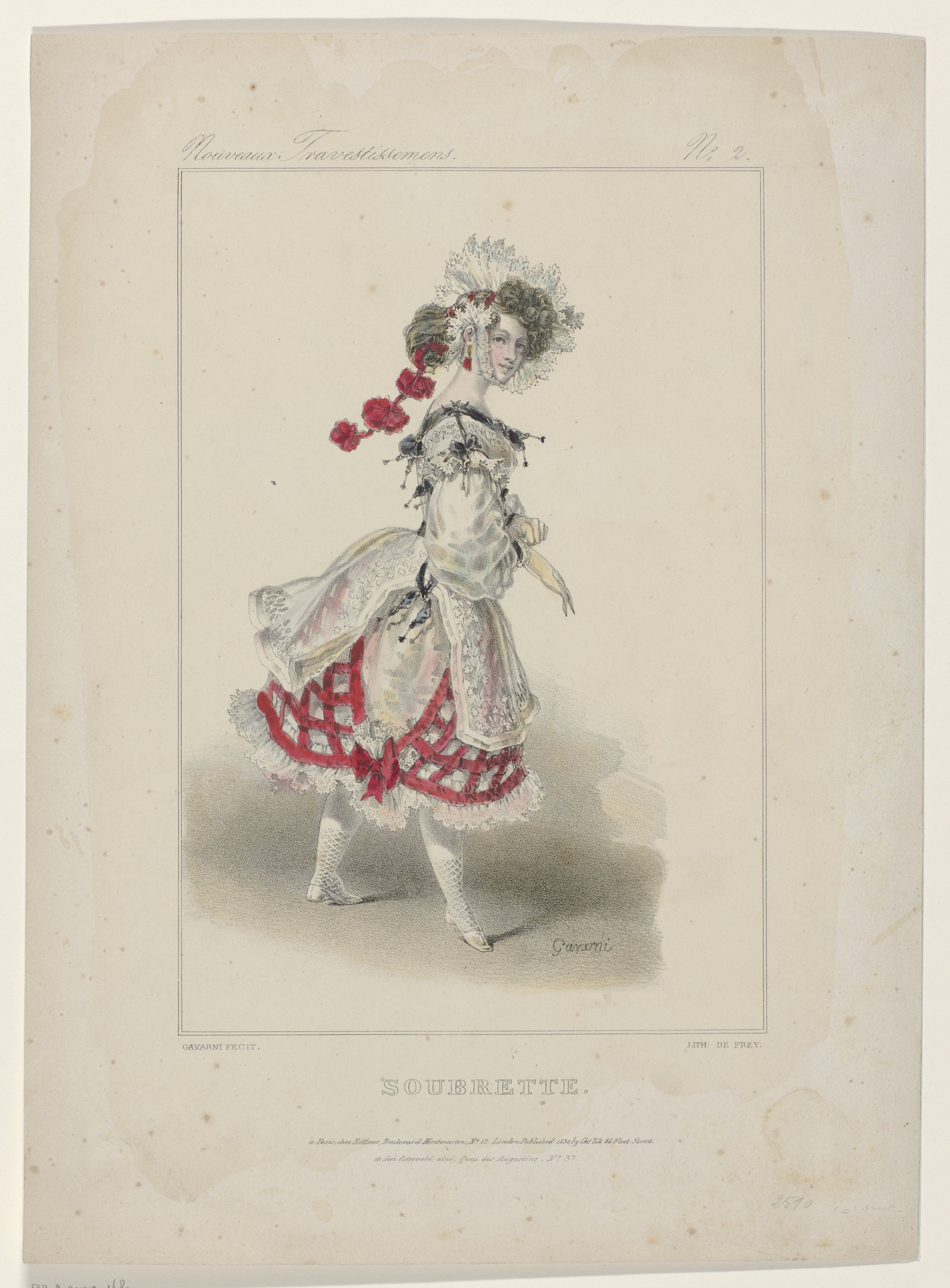 IdentificatieTitel(s): Nouveaux Travestissemens, 1830, No. 2 : SoubretteObjecttype: modeprent Objectnummer: RP-P-2009-1680Opschriften / Merken: titel, linksboven, gedrukt: ‘Nouveaux Travestissemens. / No. 2’titel, midden onder, gedrukt: ‘SOUBRETTE.’adres, midden onder, gedrukt: ‘ à Paris.chez Rittner, Boulevard Montmartre, No.12. London Published 1830, by Chs Tilt 86 Fleet Street. et chez Ostervald ainé, Quai des Augustins, No. 37.’Omschrijving: Travesti of verkleedkleren. Een vrouw verkleed als een 'soubrette' (dienstmeisje).VervaardigingVervaardiger: prentmaker: Paul Gavarni (vermeld op object)drukker: Georges Jean Frey (vermeld op object)uitgever: Henri Rittner (vermeld op object)Plaats vervaardiging: ParijsDatering: 1830Fysieke kenmerken: lithografie, met de hand gekleurdMateriaal: papier Techniek: lithografie (techniek) / met de hand kleurenAfmetingen: blad: h 330 mm × b 240 mmOnderwerpWat: fashion platesdress-up party (+ women's clothes)dress, gown (+ women's clothes)styles of hairdress - AA - ~ womenmaid ~ house personnel (+ variant)Wanneer: 1830 - 1830Verwerving en rechtenCredit line: Aankoop uit het F.G. Waller-FondsVerwerving: aankoop 30-sep-2009Copyright: Publiek domein